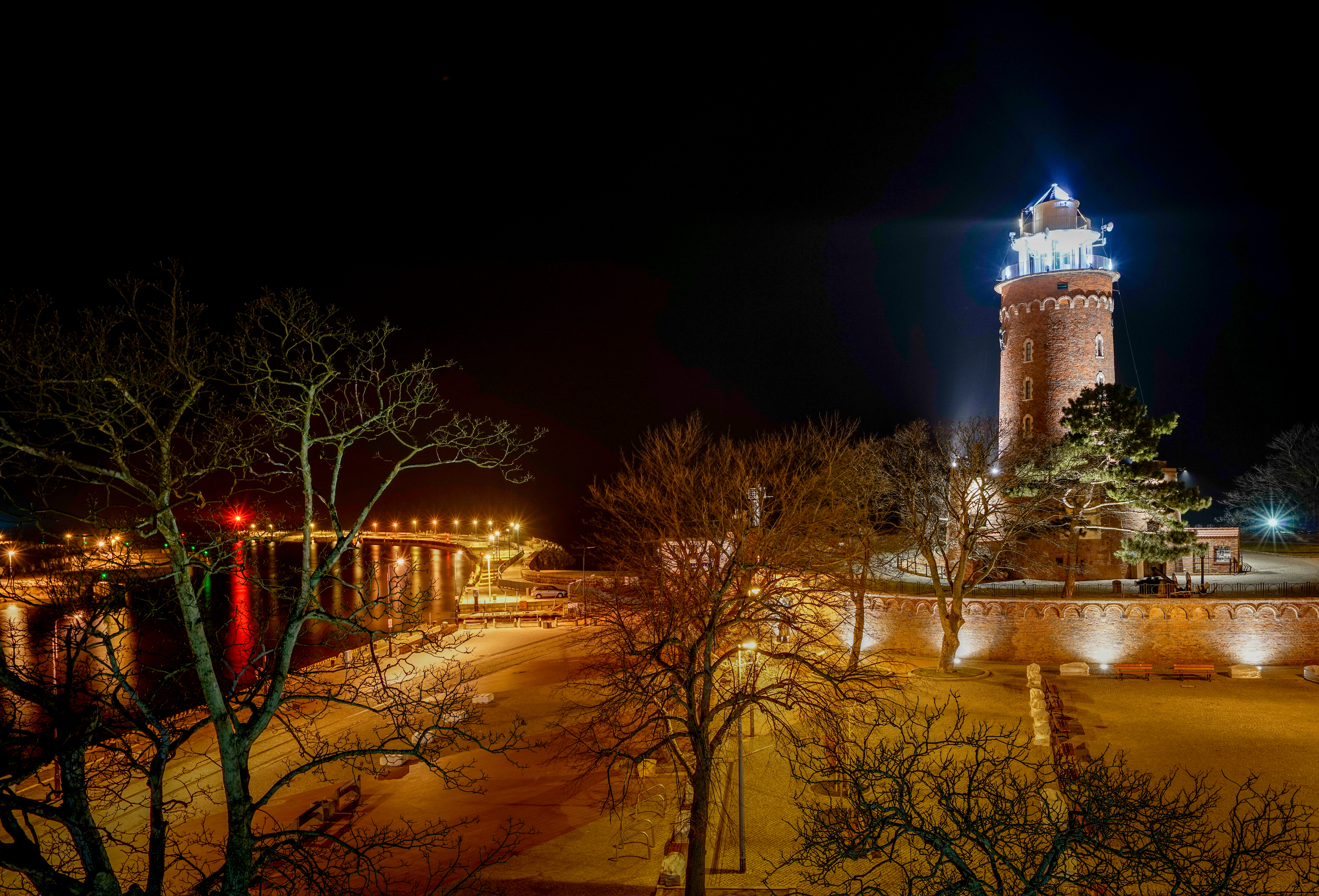 Ujście Parsęty, latarnia morska w Kołobrzegu